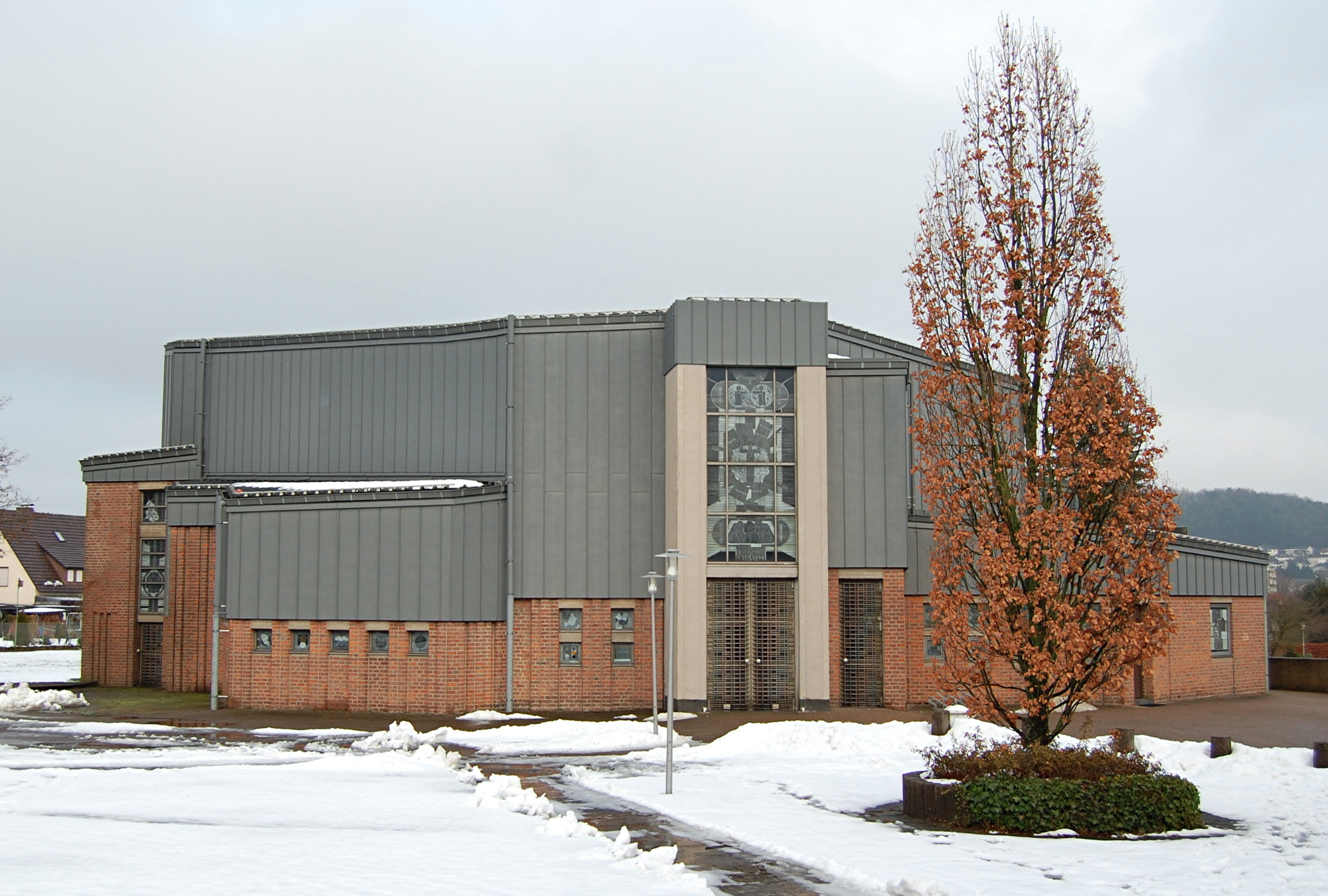 Die Südwestseite der 1968 eingeweihten katholischen Kirche „Zum verklärten Christus“ in der Driburger Südstadt, Bad Driburg, Nordrhein-Westfalen, Deutschland.